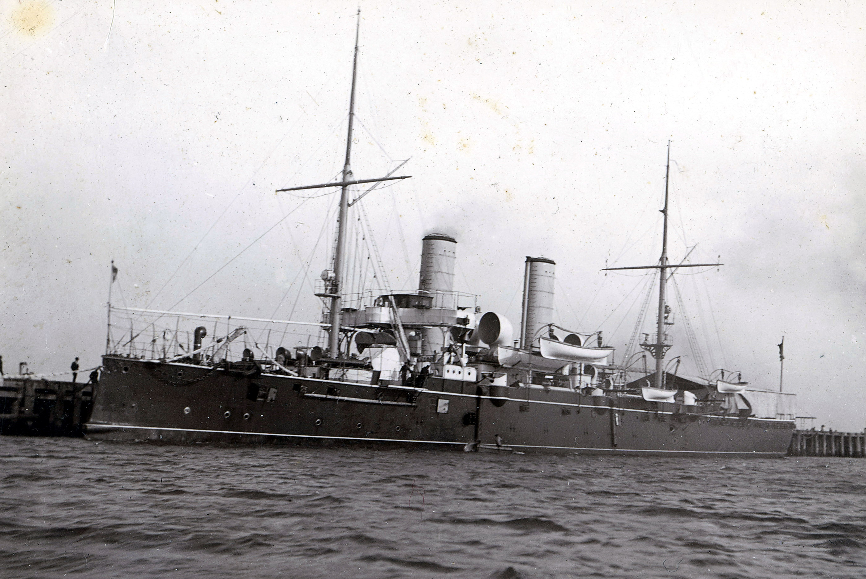 Foto della prima crociera dell'ariete torpediniere Puglia, con partenza da Taranto il 23 marzo del 1901, sosta a Napoli e trasferimento alla Spezia per essere armata per il lungo viaggio in Australia con il compito di negoziare l'emigrazione italiana in quell'area. Partita dalla citta' ligure il 3 giugno, giunse il 14 luglio nel porto di Fremantle della citta' australiana di Perth; dopo aver visitato Adelaide, Melbourne, Hobart Town e Sidney, lascio' Brisbane, il 30 ottobre; passando dalla Nuova Guinea e le Isole Filippine giunse in Cina per unirsi alla Forza Navale oceanica in Estremo Oriente. Nell'occasione l'unita' era dipinta con colorazione grigio scuro.